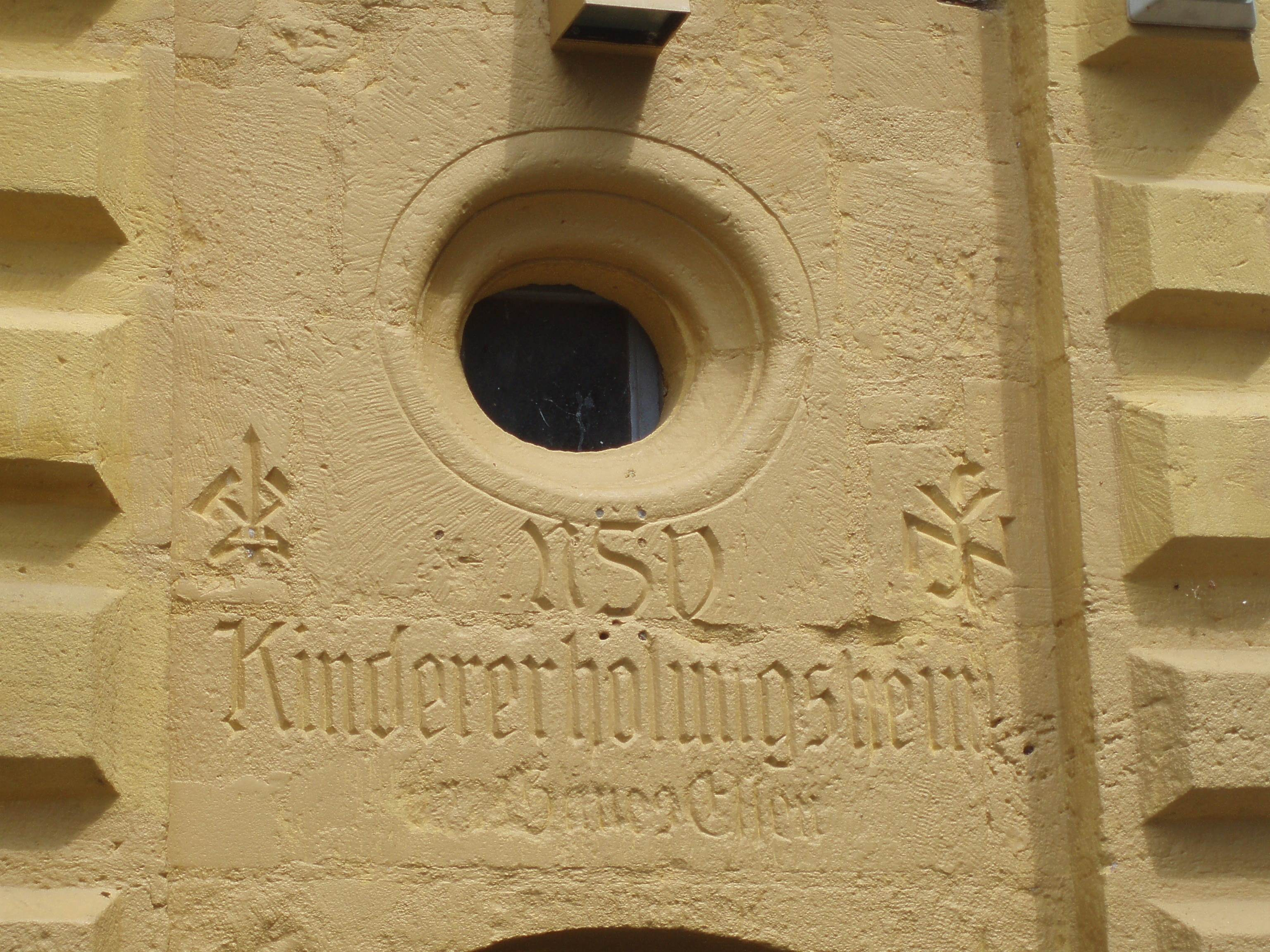 Ehemaliges NSV-Kindererholungsheim Marisfeld